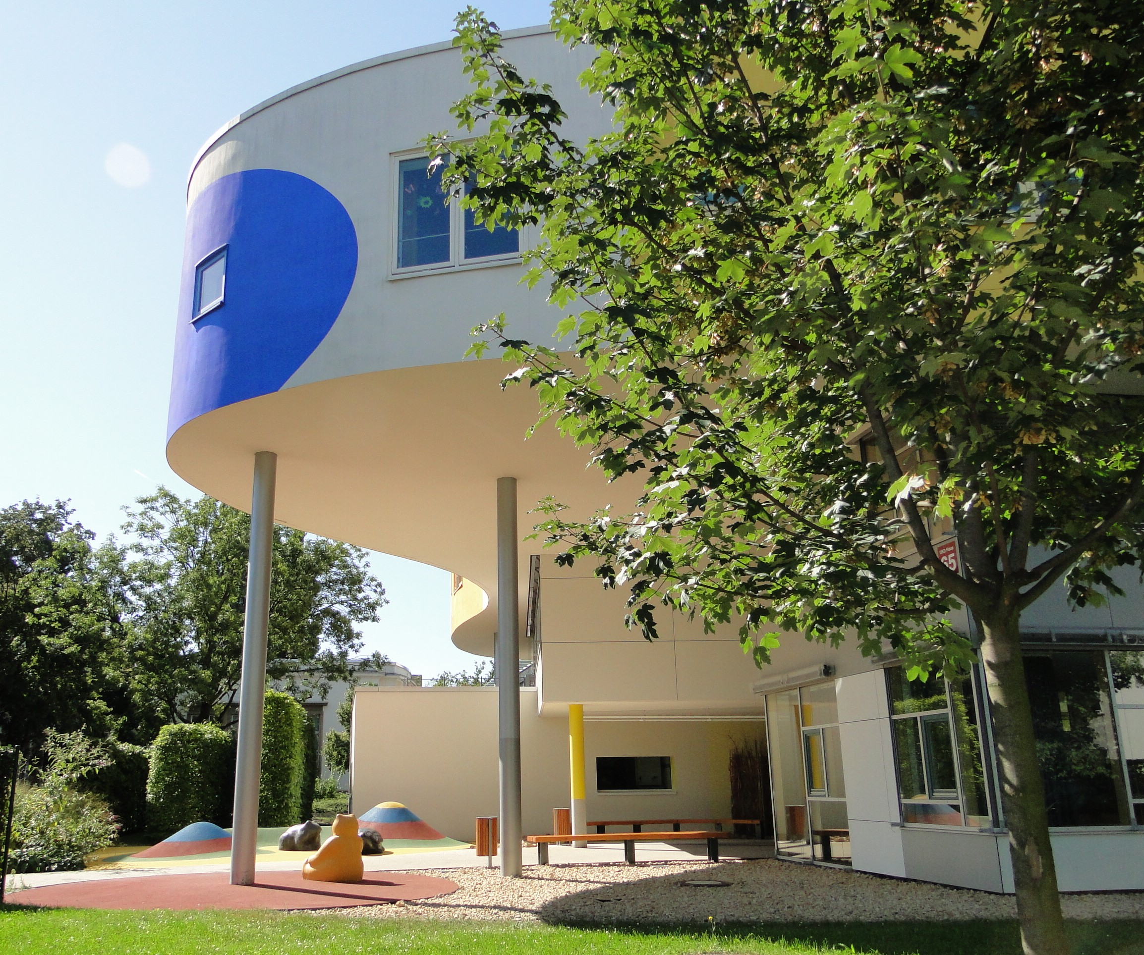 Mildred-Scheel-Haus, Erweiterungsbau, des Universitätsklinikums in Dresden